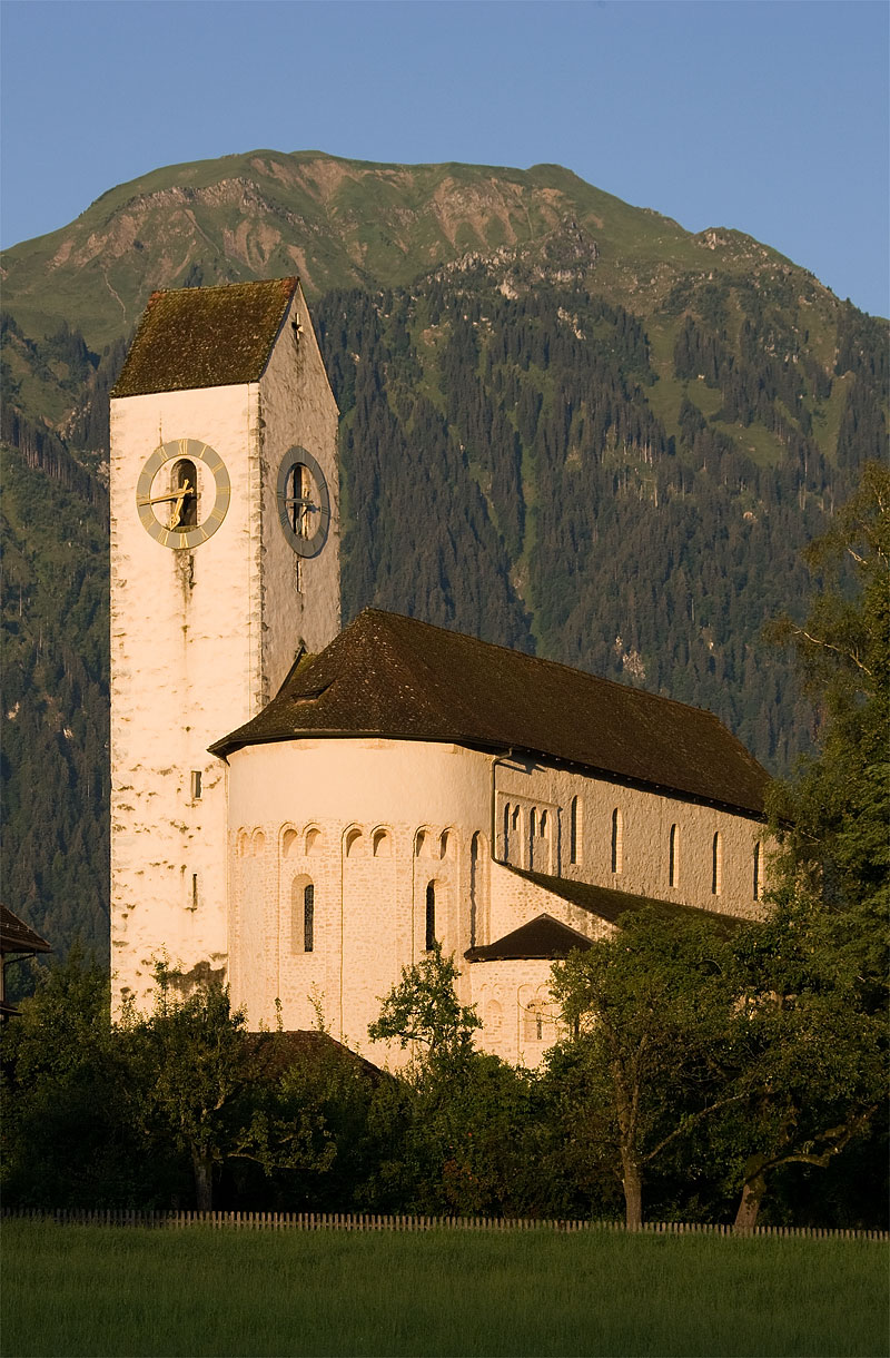 Kirche von Amsoldingen